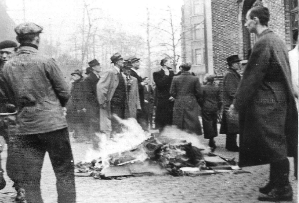 Image issue d'un film tourné par la propagande nazie à Anvers en 1941 tombée dans le domaine public